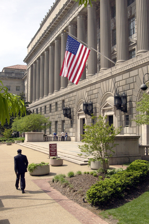 Hlavní vchod do budovy amerického ministerstva obchodu